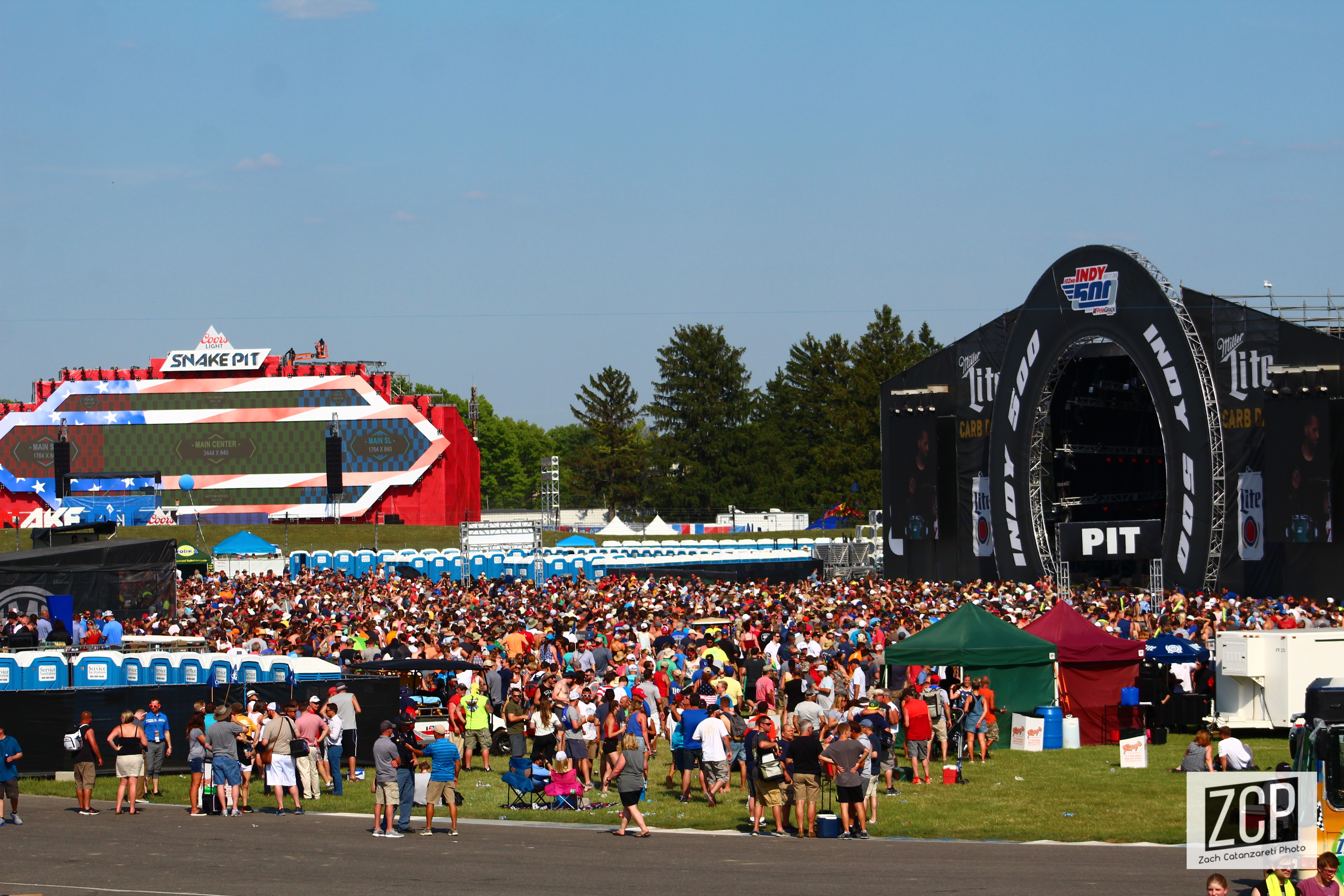 2018 Indianapolis 500